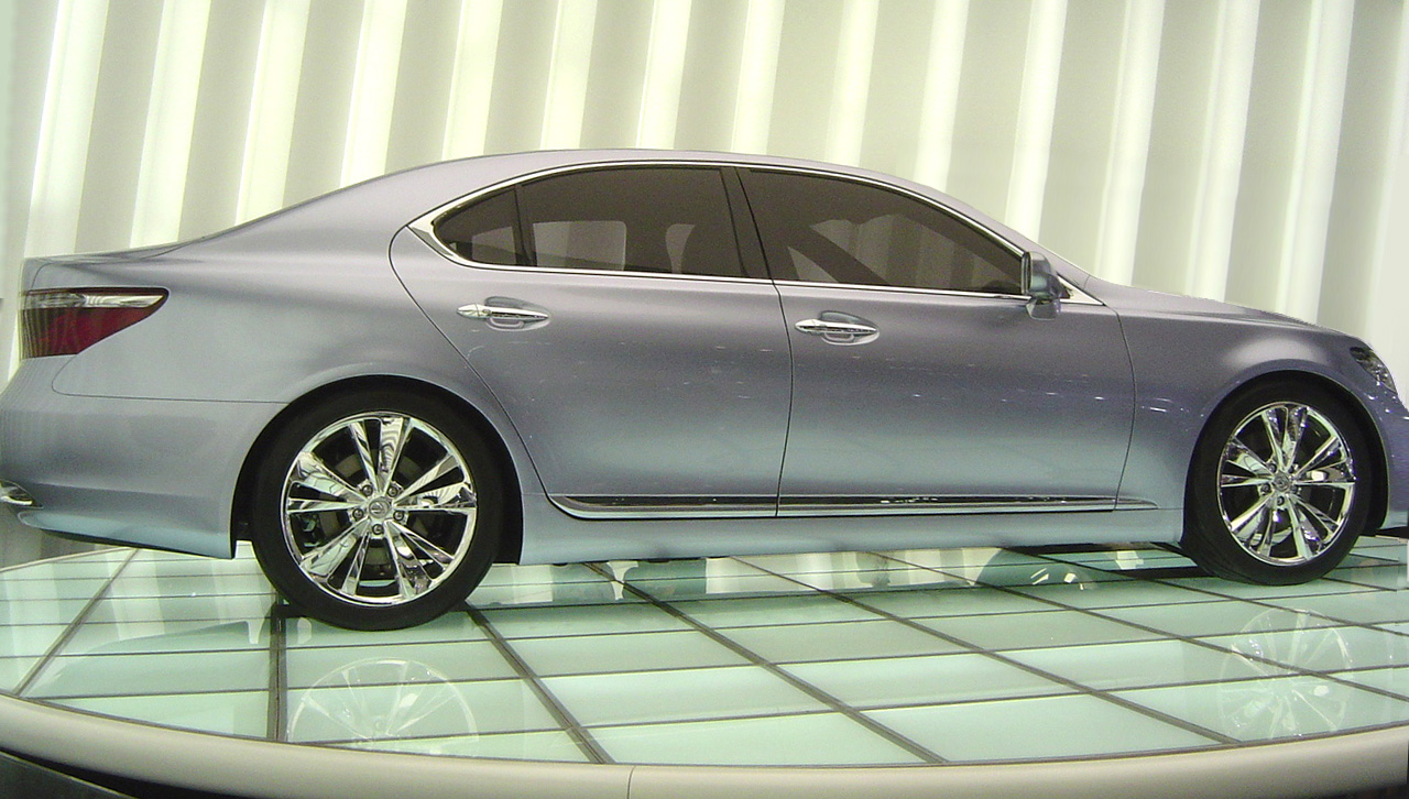 Lexus LF-Sh concept